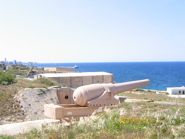 Armstrong RML 17.72 inch gun in Fort Rinella, Malta